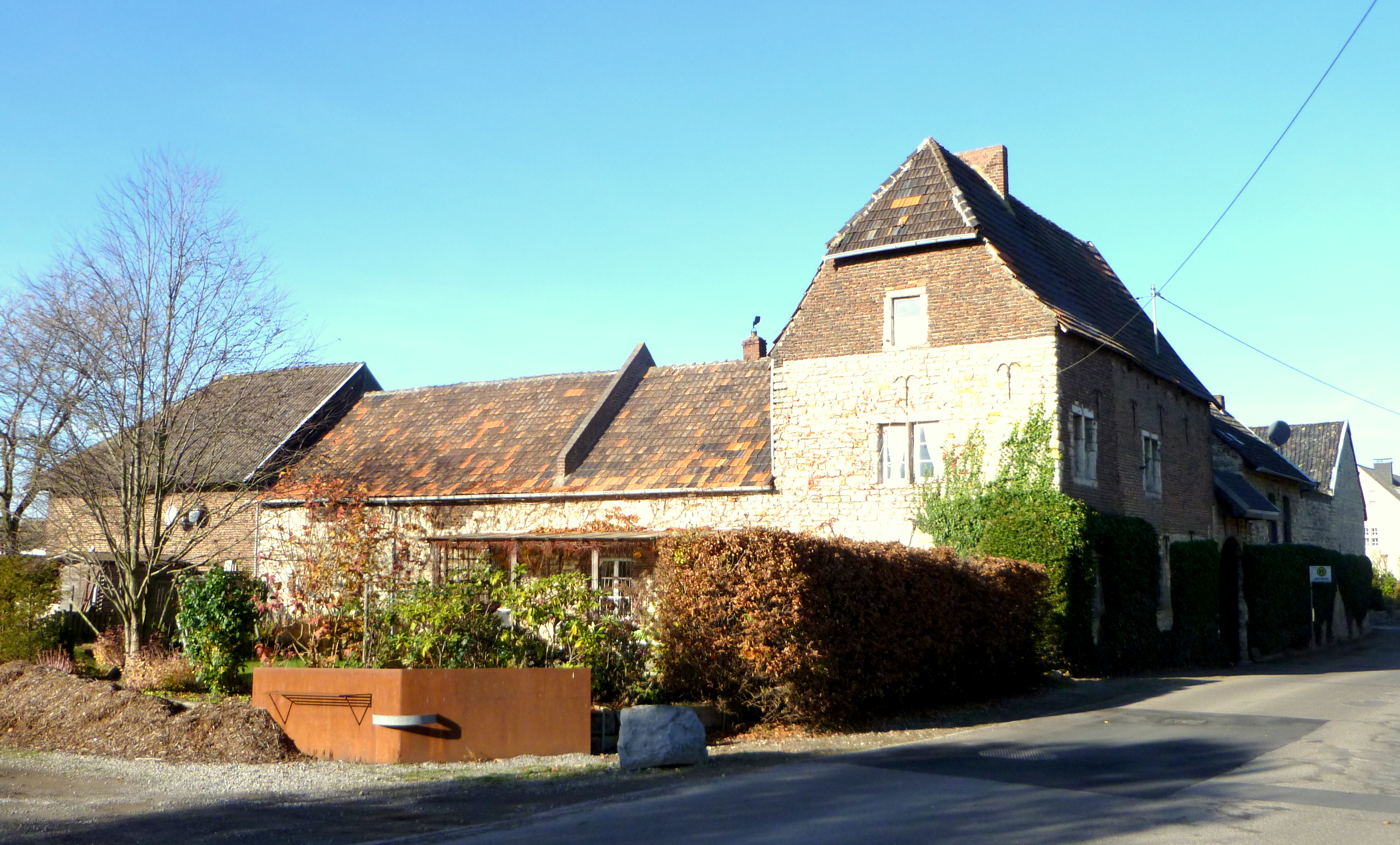 Baudenkmal in Aachen-Laurensberg